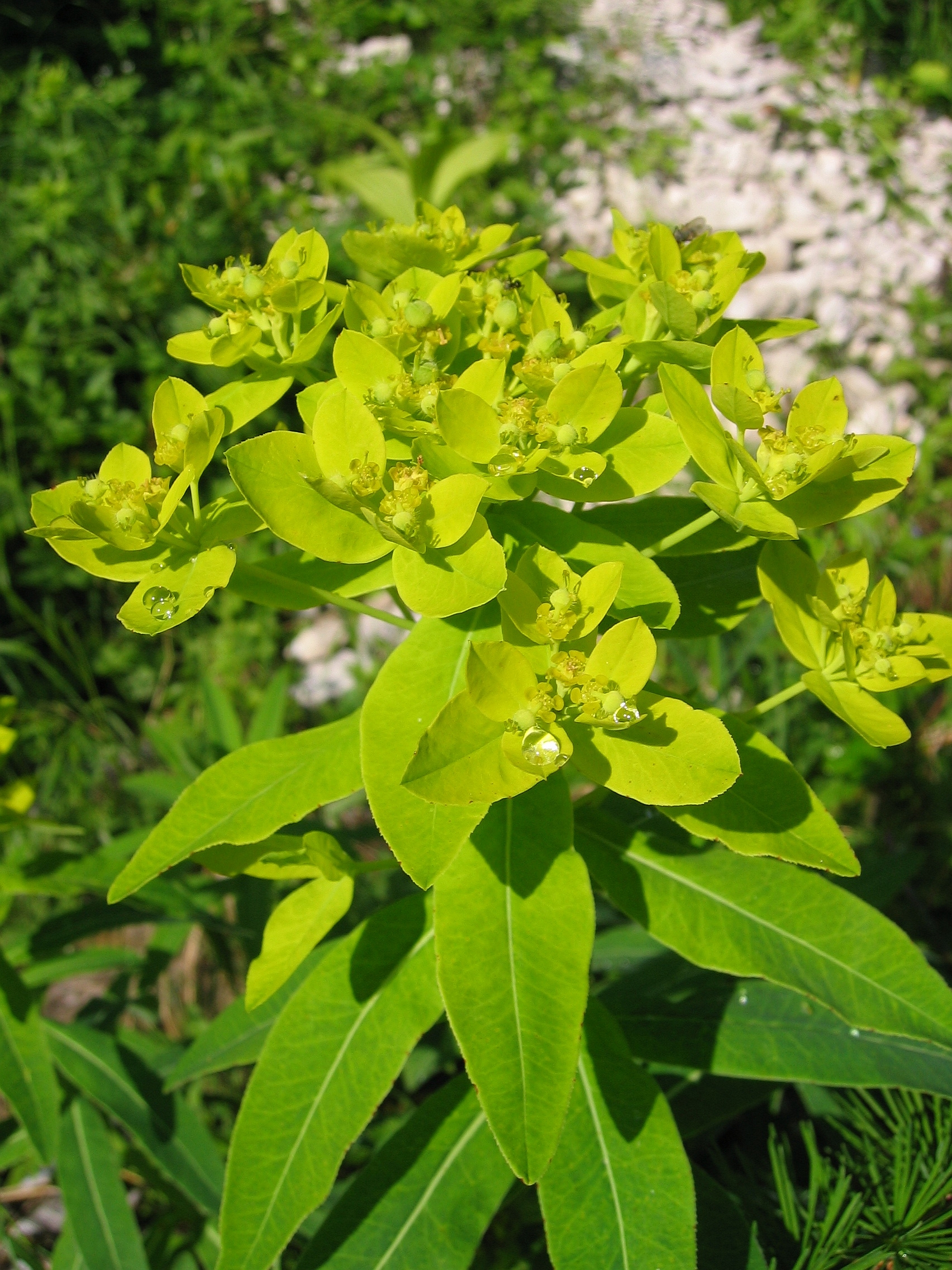 Euphorbia austriaca, Near Rinnerhütte, ~1.300 m, Upper Austria, Austria